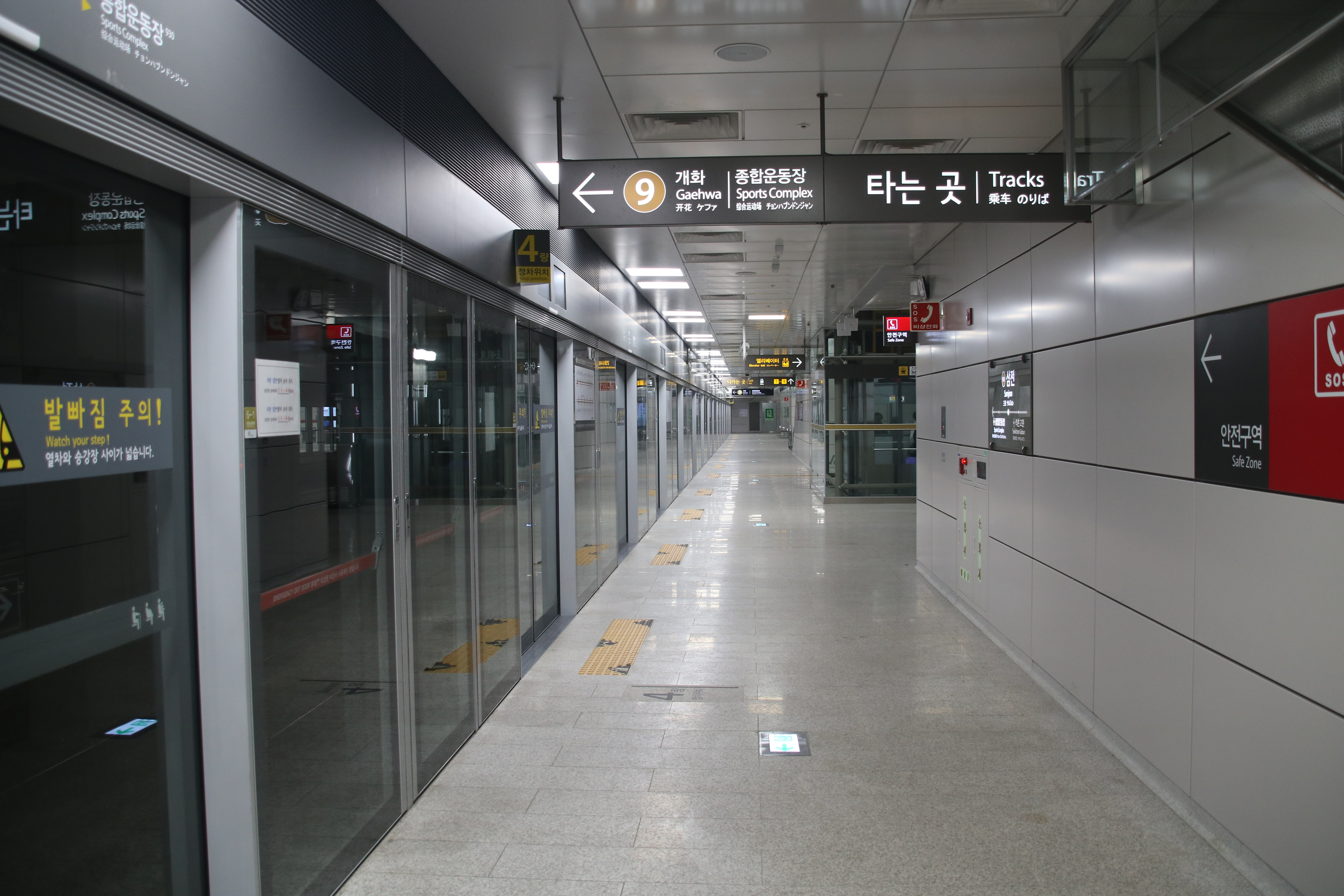 승강장(개화 방면)